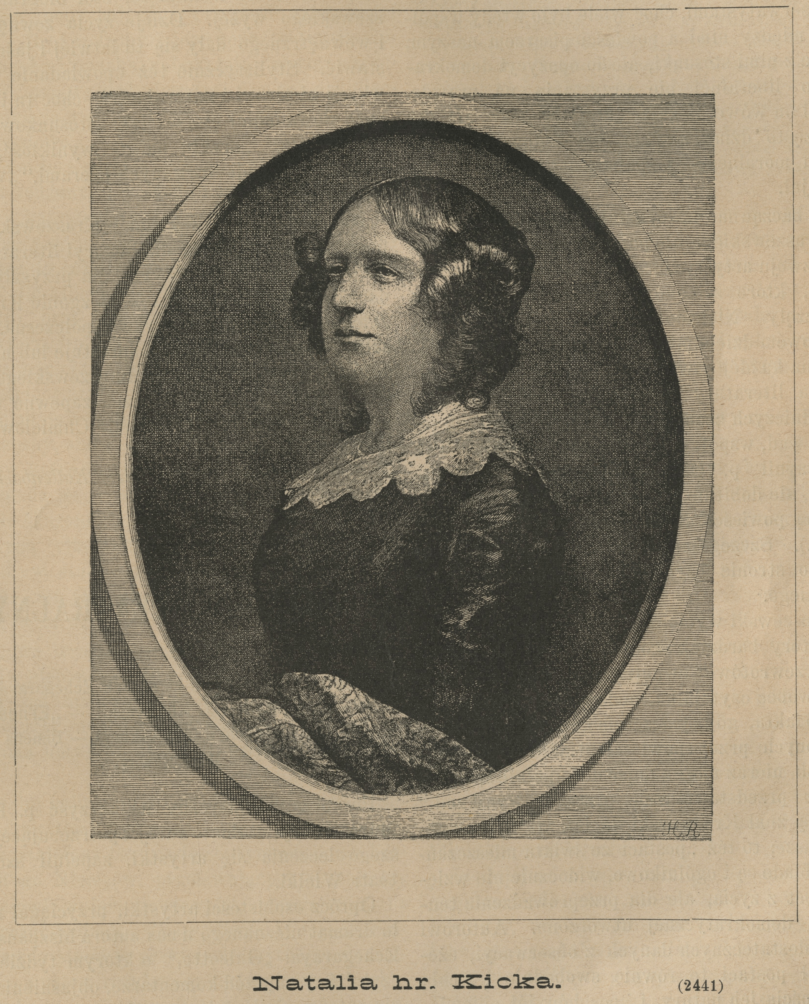 Natalia Kicka